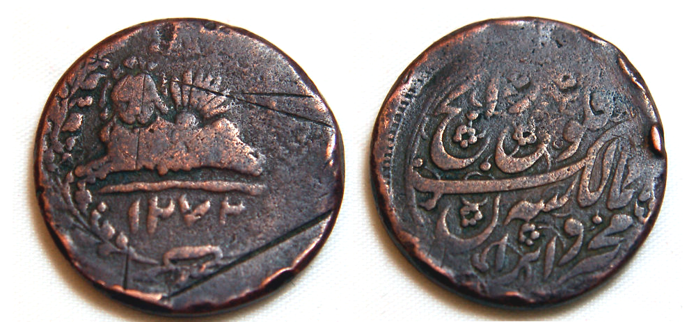 سکه مسی فلوس مربوط به دوران قاجار بر روی سکه نشان شیر و خورشید و بر پشت آن عنوان «فلوس» و نام ایران به چشم می خورد. Folus; Copper coin of the Qajar dynasty